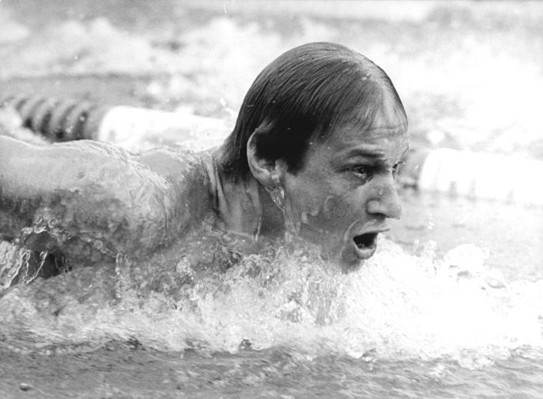 Roger Pyttel ADN-ZD-Kluge-8-7-77 Leipzig: 28. DDR-Meisterschaft im Sportschwimmen- 3. Tag -Über 200 m Schmetterling der Herren hofft der Leipziger DHfK-Sportler Roger Pyttel seinen 26. DDR-Meistertitel zu erringen. Mit 2:06,28 min erreichte er die schnellste Vorlaufzeit (Foto). Der 20jährige Titelverteidiger war bereits am Eröffnungstag über 100m Freistil erfolgreich.